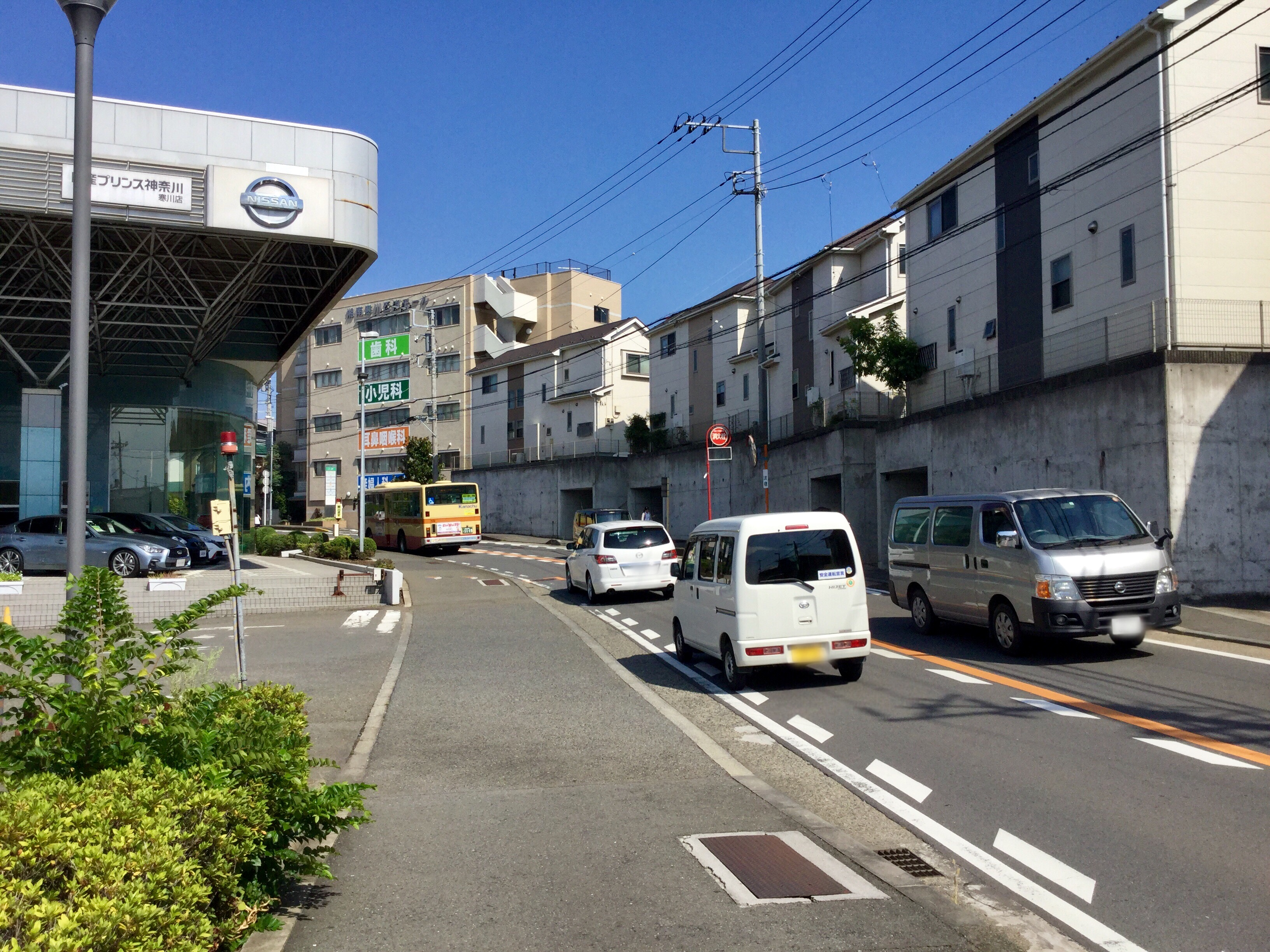 神奈川県道45号線(中原街道)